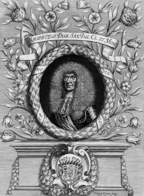 Gravure représentant Maurice de Saxe-Zeitz (1619-1681) Source Deutsche Fotothek, réf. Nr. df_0274498 Auteur inconnu Date : entre 1640 et 1680